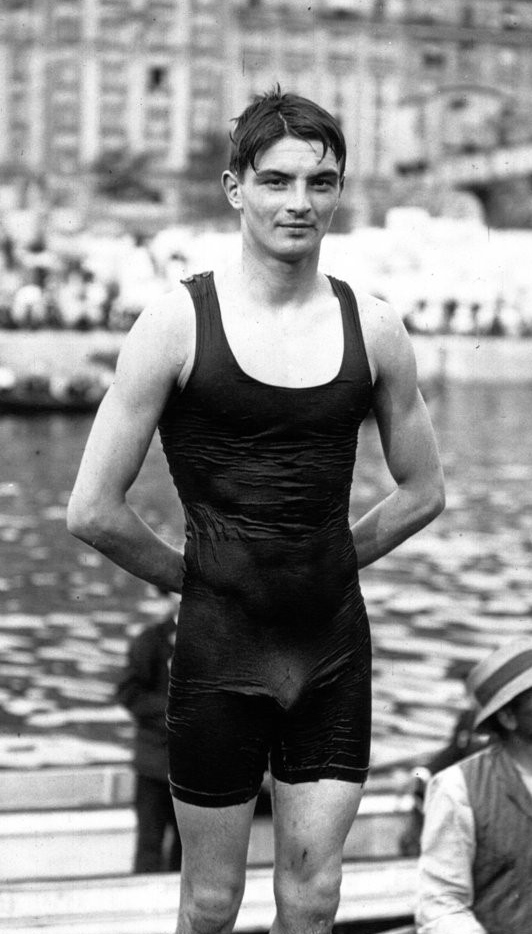 René Paulus : nageur : [photographie de presse] / Agence Meurisse